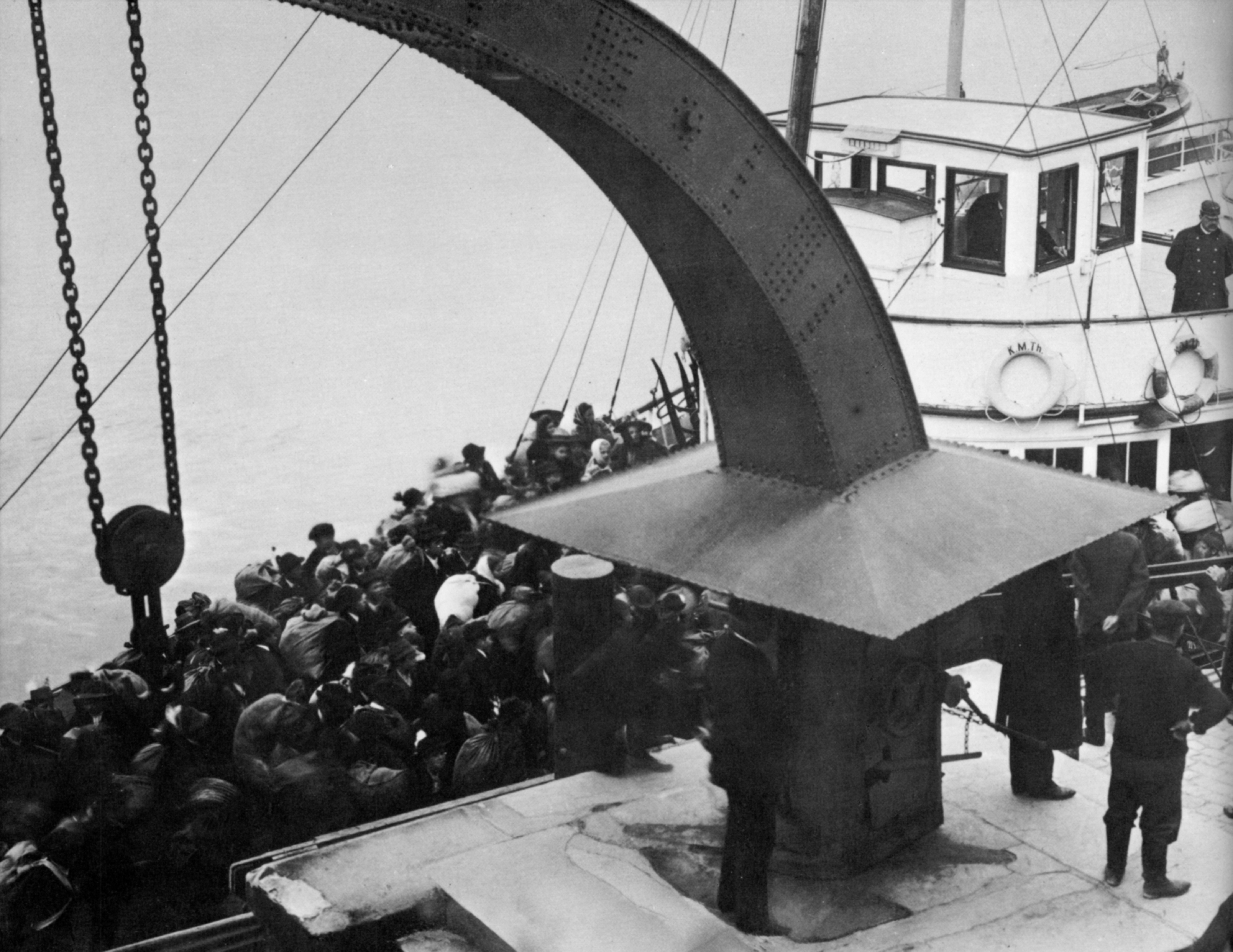 Tiroler Schwabenkinder bei der Ankunft in Friedrichshafen